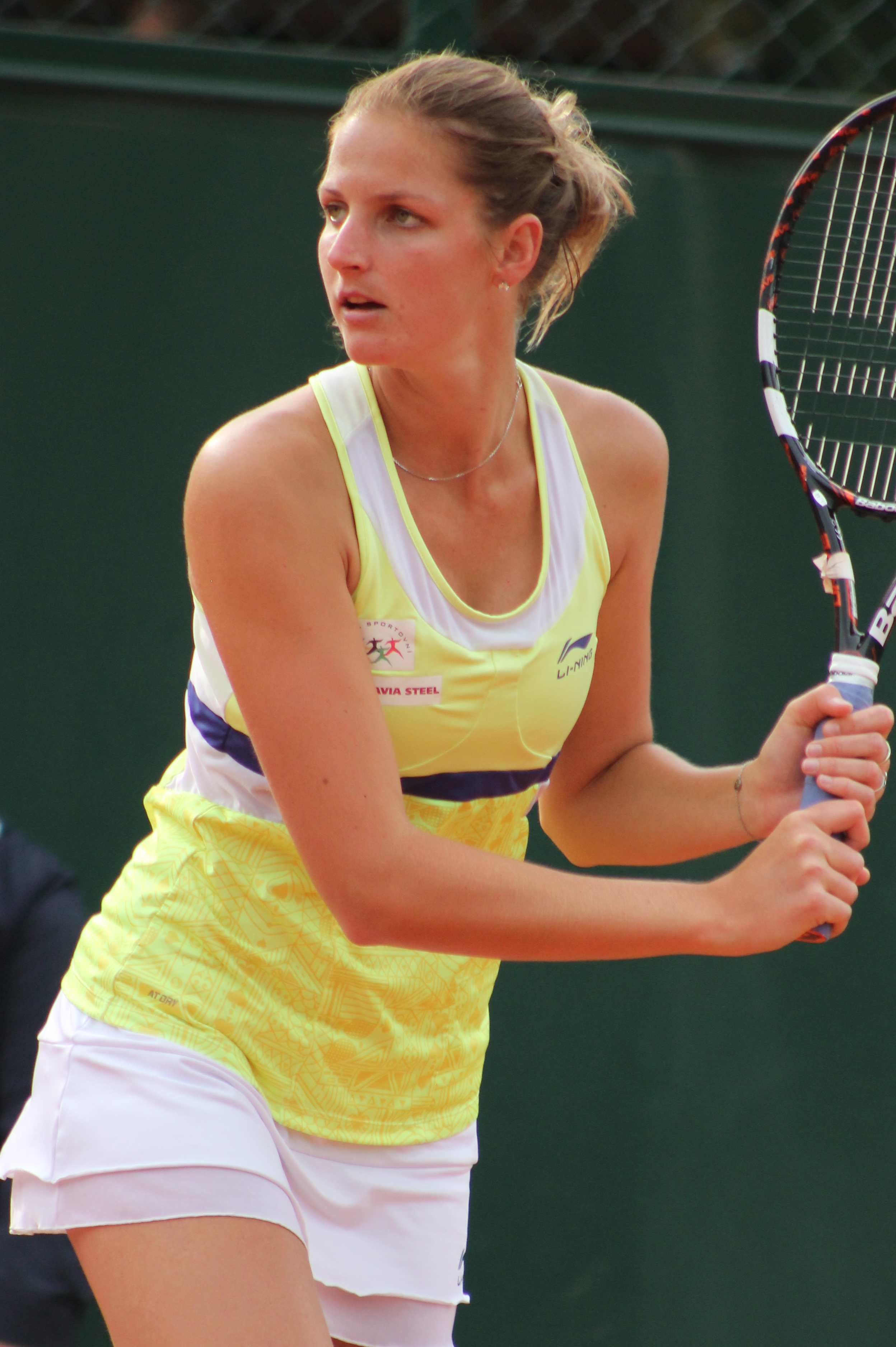 Pliskova Ka. RG15 (14)